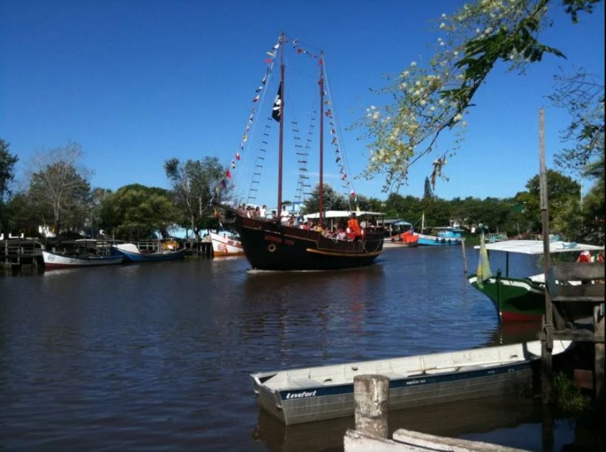 River in São Lourenço do Sul, Brazil